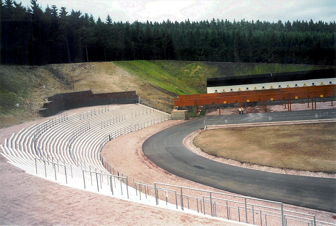 Oberhof, Rennsteig-Arena, 2